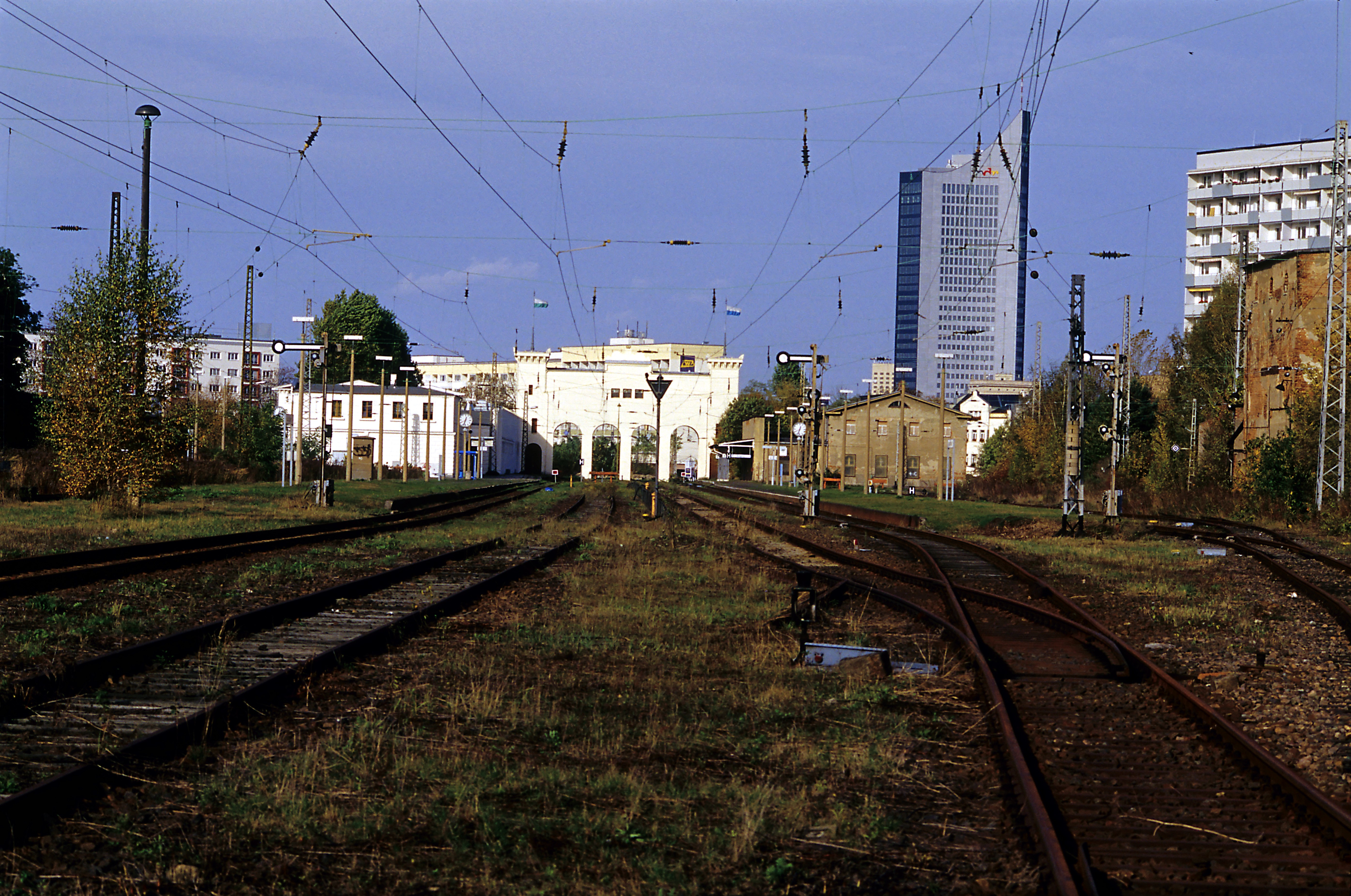 Blick in die ehemalige Bahnsteighalle mit den Gleisen 4 bis 7 (von rechts). Rechts die ehemalige Ankunfts-, links die Abfahrtsseite. Auf der Innenseite des Portikus gab es eine in den Achtzigern abgebrochene Fußgängerbrücke. Das ehemalige Umlaufgleis 6 wurde schon vor Jahrzehnten verkürzt und erreicht den Portikus nicht mehr. Drei Monate nach der Betriebseinstellung und noch knapp zwei Jahre vor dem Baubeginn der Tunnelstrecke.